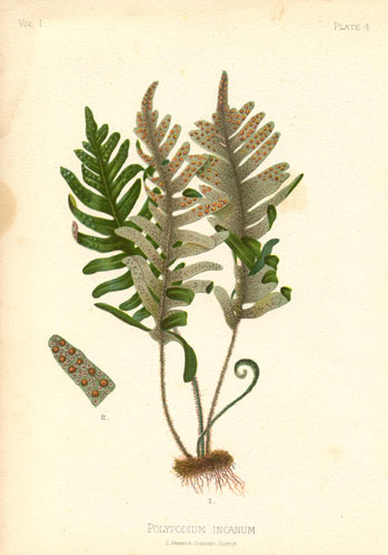 Polypodium incanum (= Pleopeltis polypodioides)